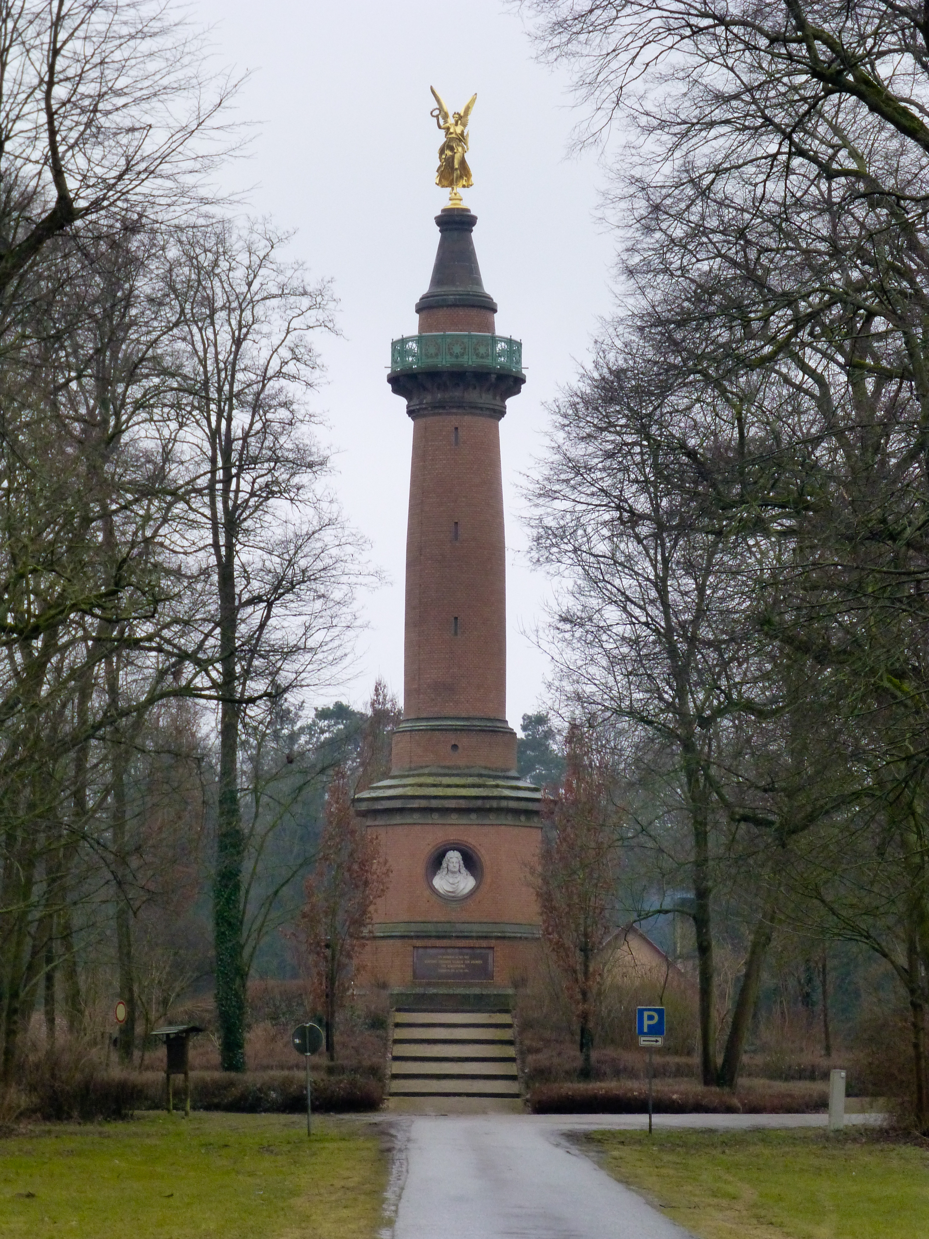 Siegessäule Hakenberg; Ansicht von der Nordostseite